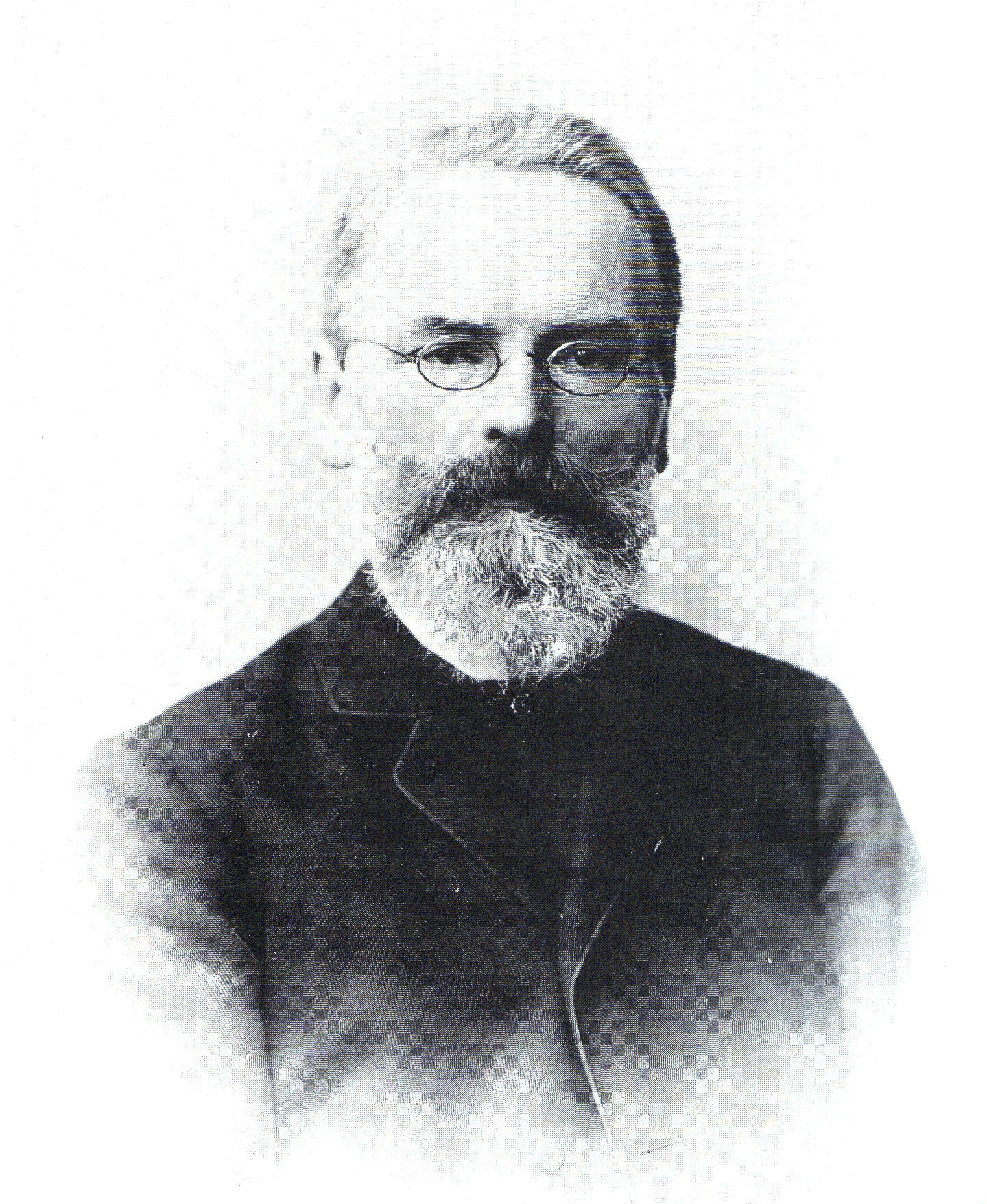 Ernst Wagner, Museumsdirektor Karlsruhe